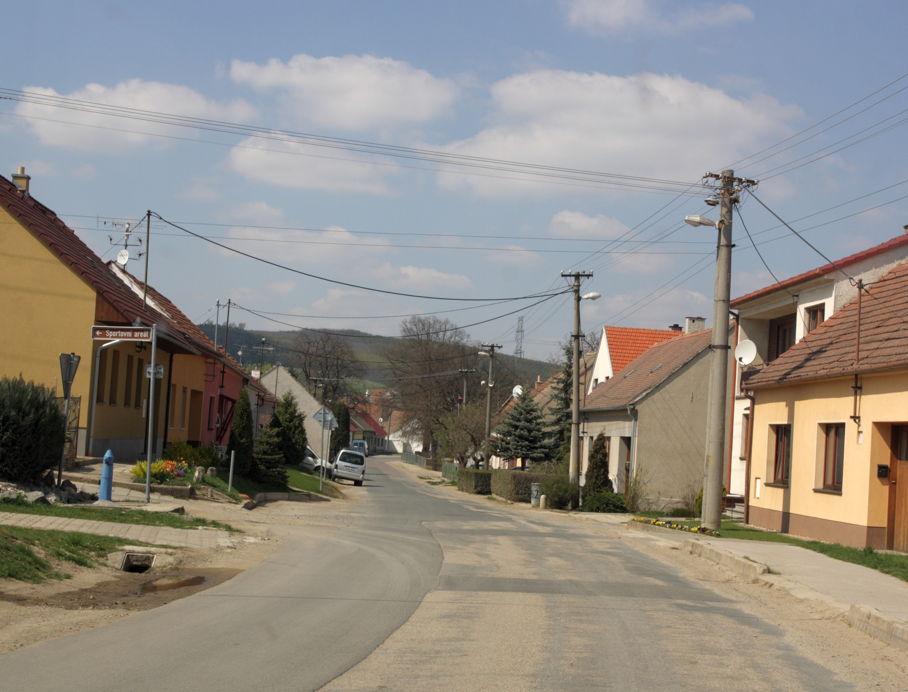 Jezeřany-Maršovice - příjezd do Maršovic z Jezeřan.